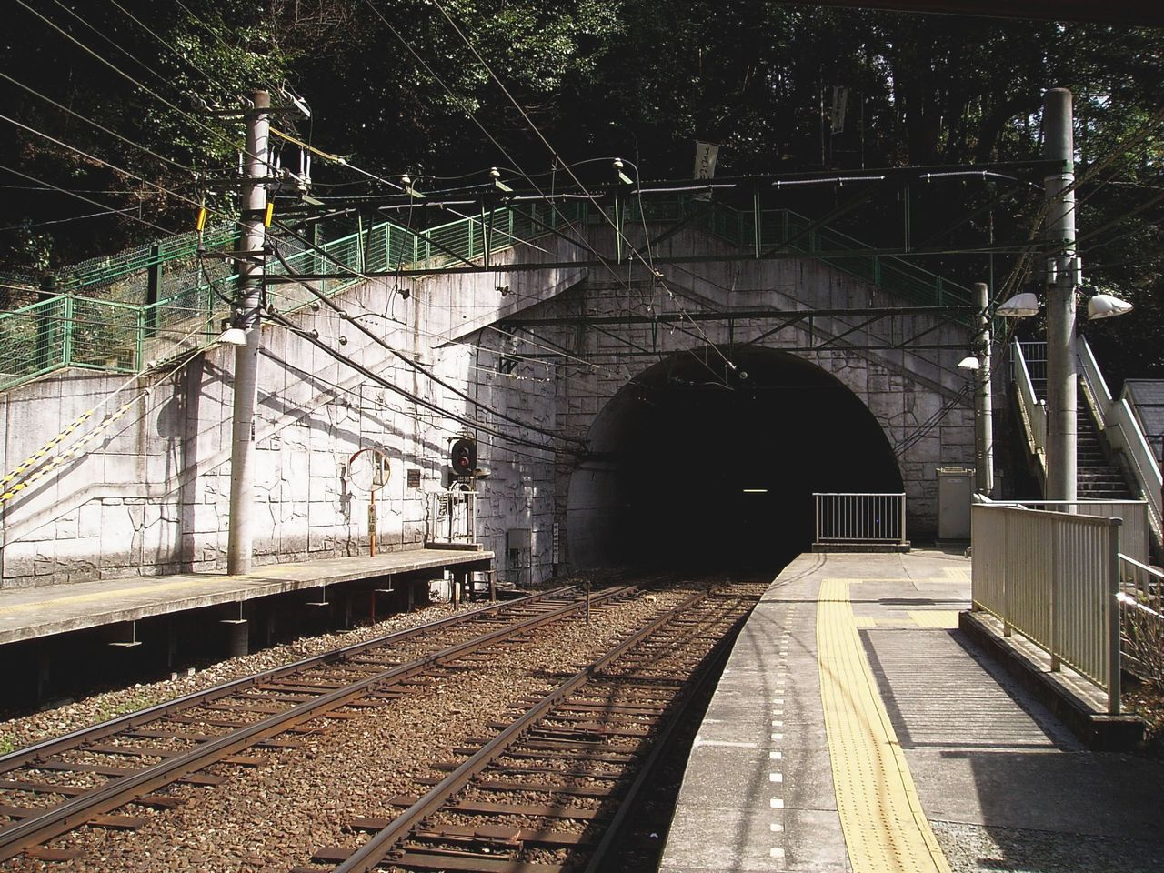 Tōnosawa Station, on the Hakone Tozan Line, Hakone, Kanagawaja:塔ノ沢駅